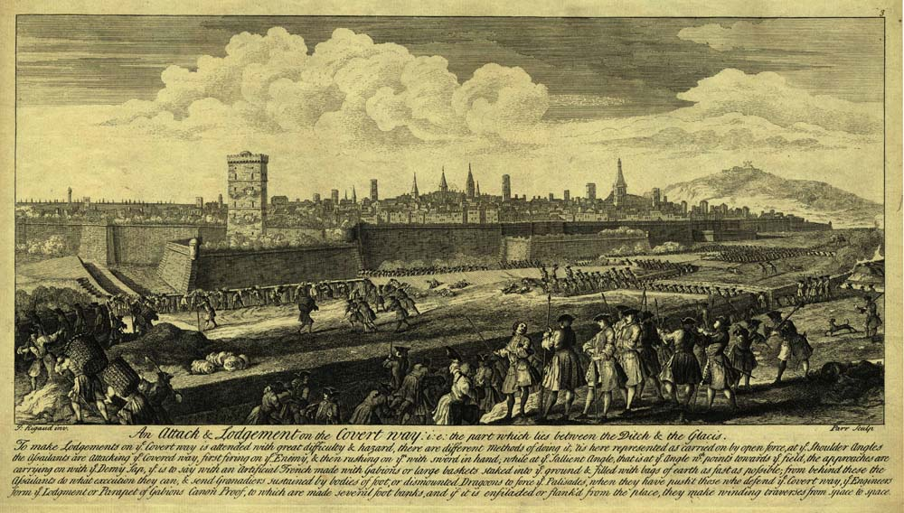 Sitio Barcelona 1714 Camino encubierto